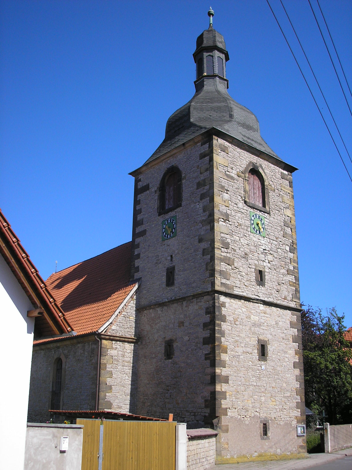 Die Kirche von Kühnhausen bei Erfurt.